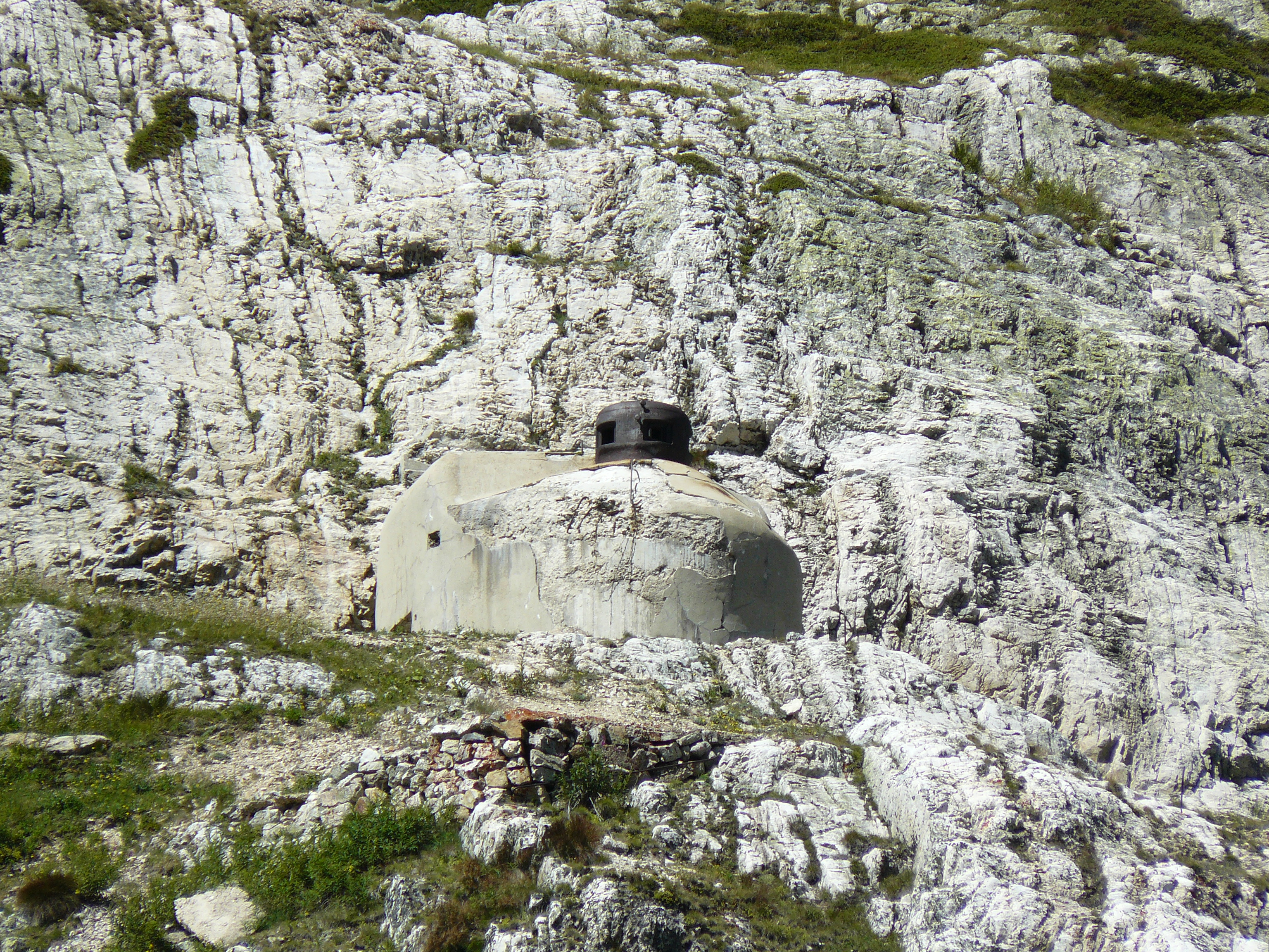 Bloc 1 avec sa cloche, de l'ouvrage des Rochilles de la ligne Maginot dans les Alpes, près du Seuil des Rochilles.